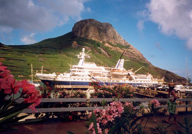 Die „World Discoverer“ vor Ua Pou, Marquesas, Französisch-Polynesien